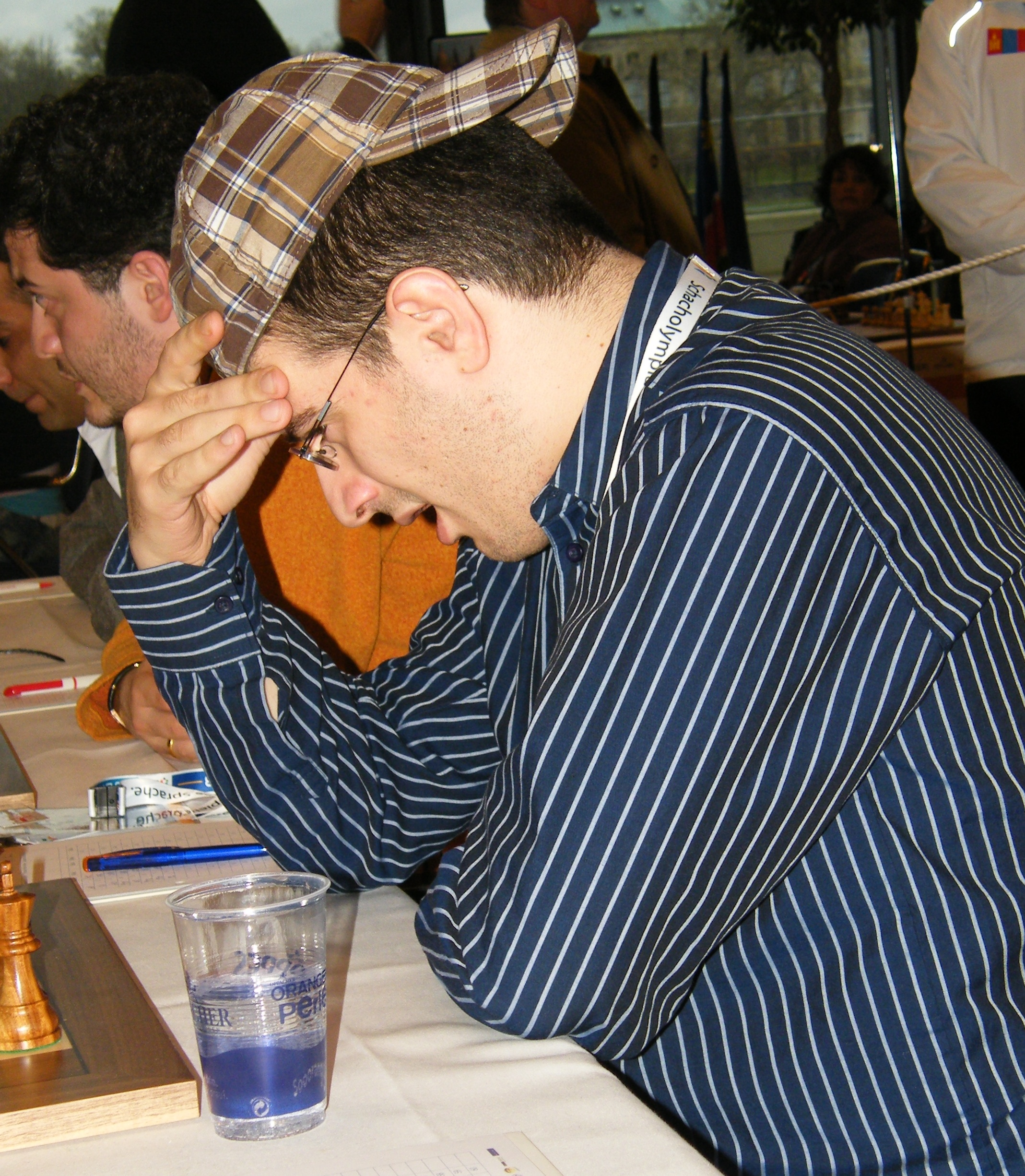 Zviad Izoria bei der 38. Schacholympiade in Dresden 2008